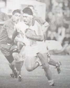 willy Taofifenua